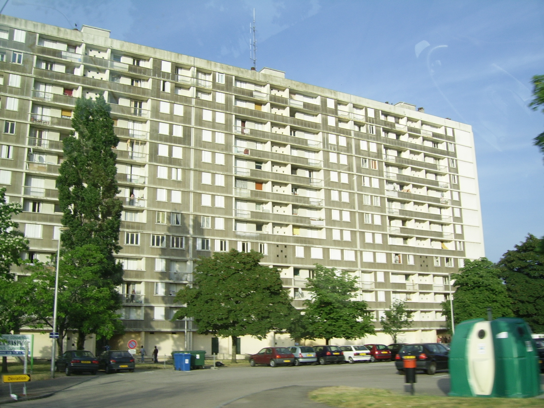 Cité de la Bastide, Limoges 87, France